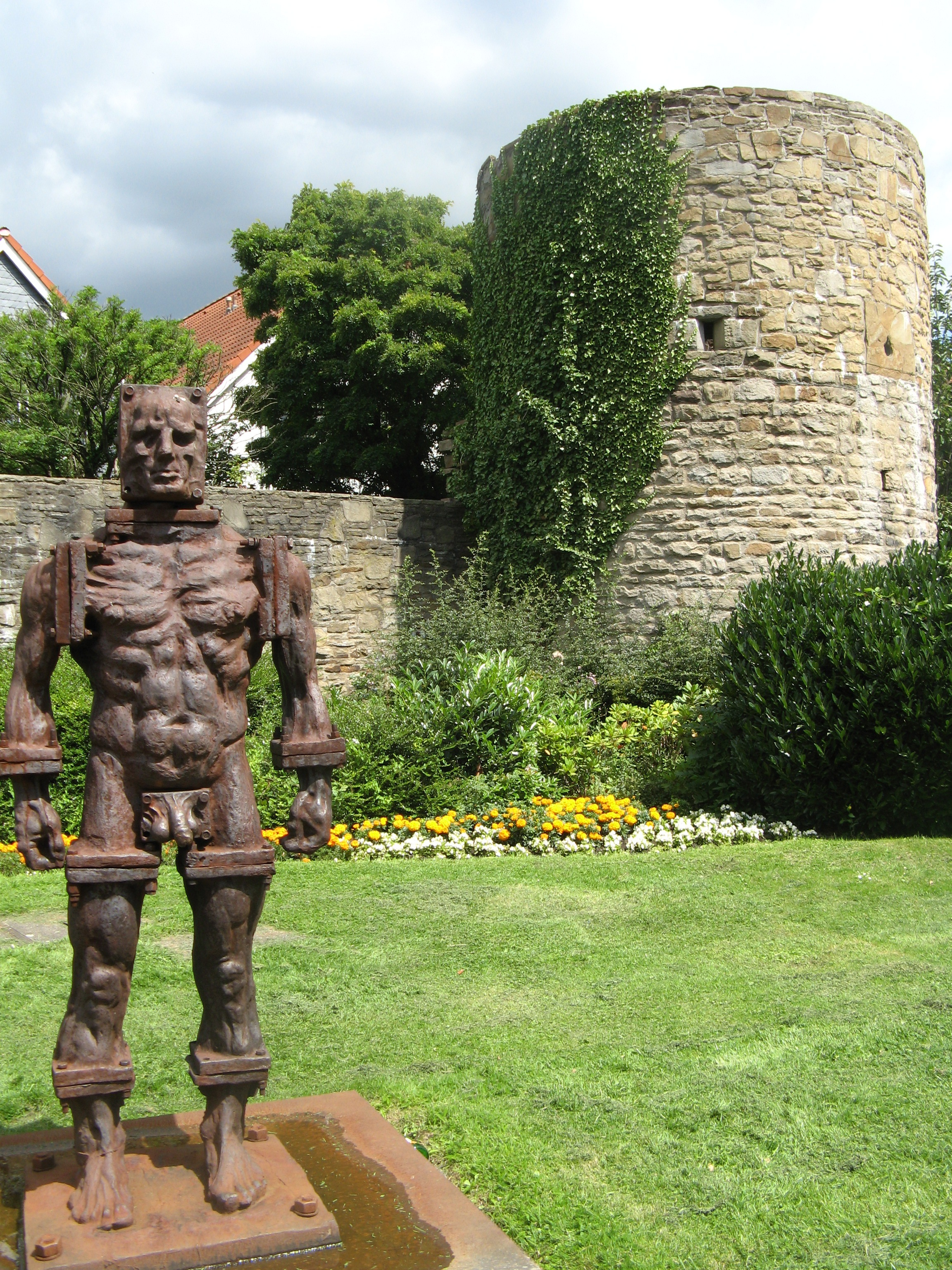 Stadtmauer Hattingen und einer der drei eisernen Männer